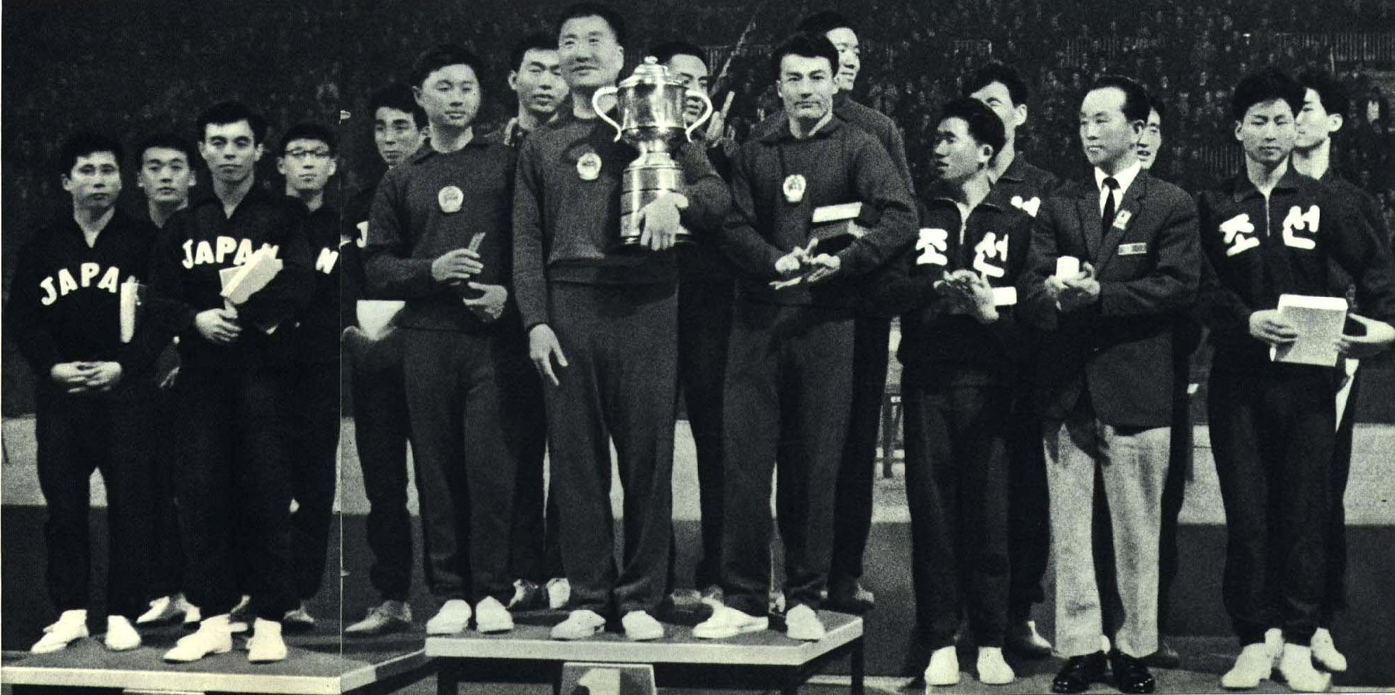 1965-7 1965年 中国男子乒乓球队获得冠军 亚军日本 季军朝鲜